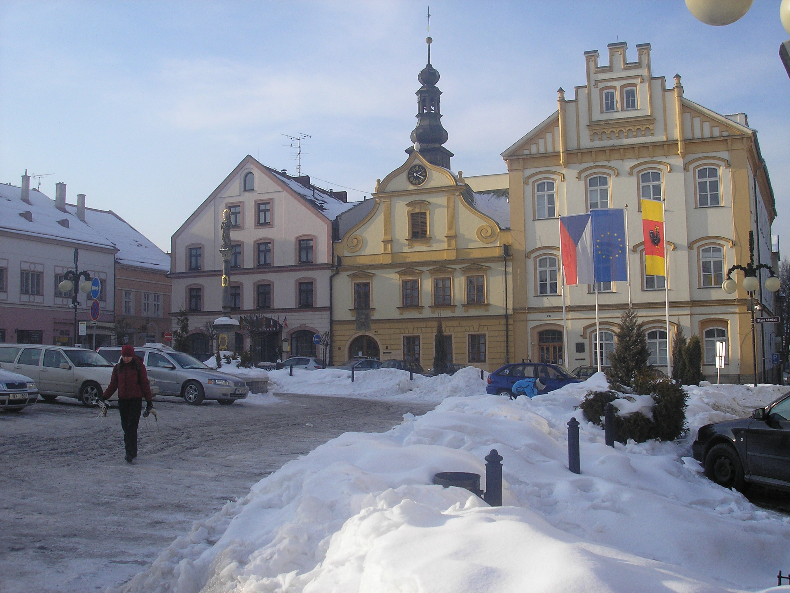 Česky: Česká Třebová, Stará a Nová radnice na Starém náměstí a morový sloup.